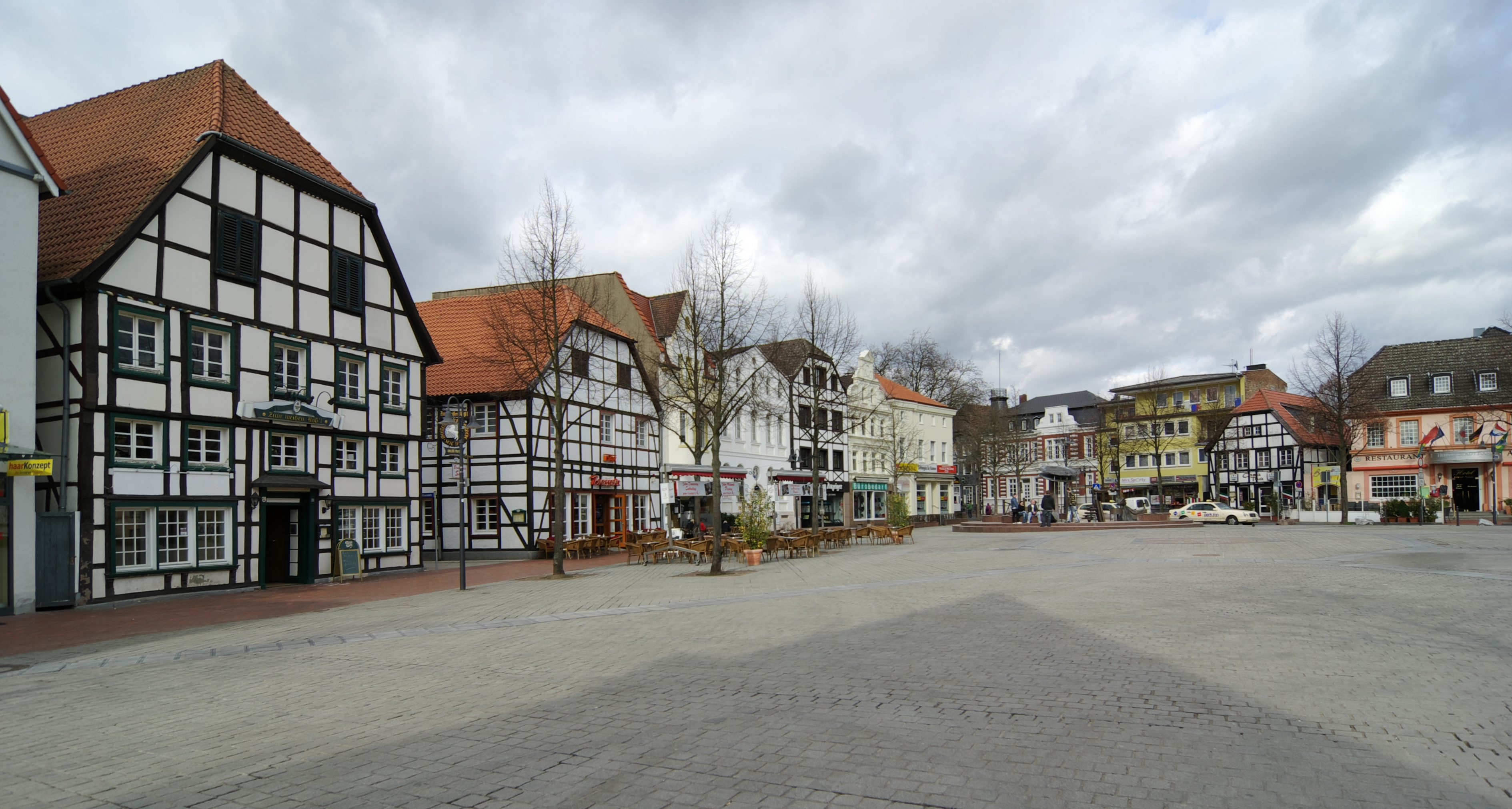 Marktplatz in Kamen, im Hintergrund der Marktbrunnen